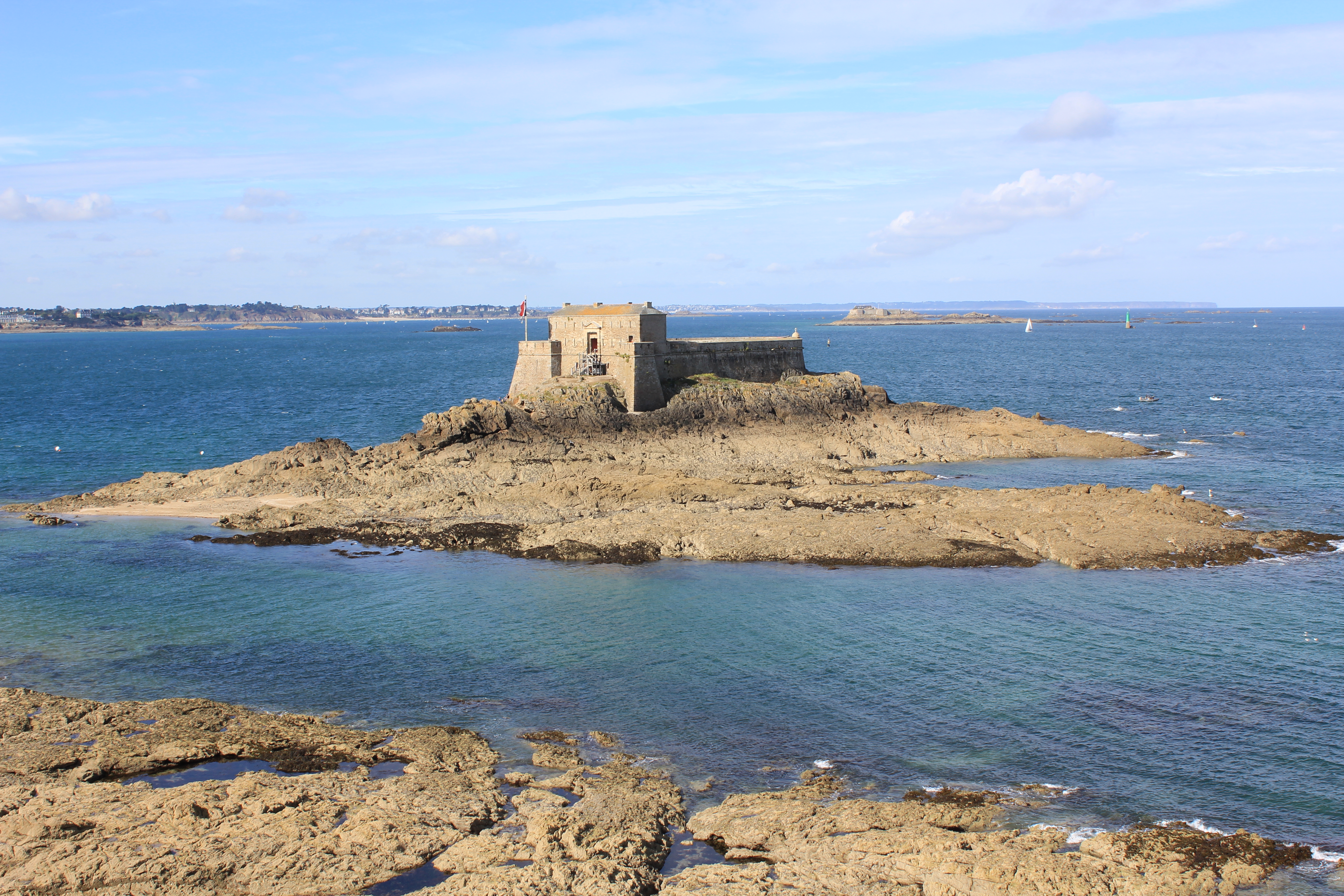 Fort du Petit Bé vu depuis du Grand Bé ; le Grand et le Petit Bé sont des iles à marée haute.